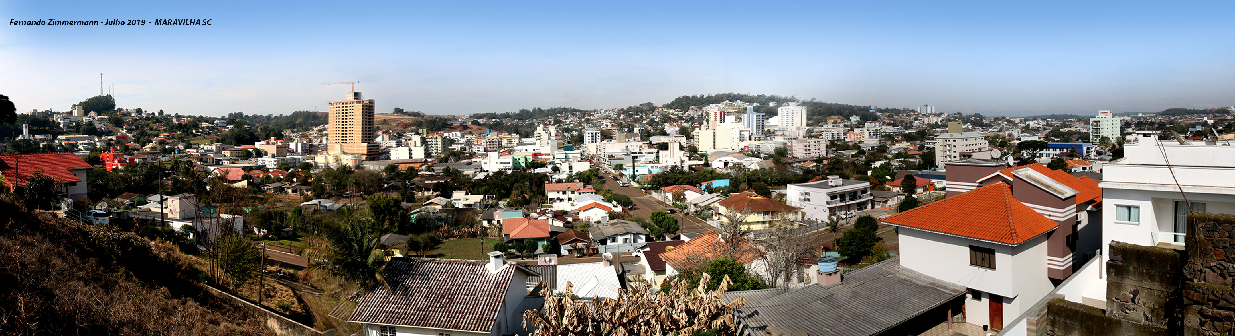 Maravilha SC - Julho de 2019